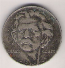 Verso de uma moeda de 300 Réis cunhada em 1938. This PNG graphic was created with GIMP.